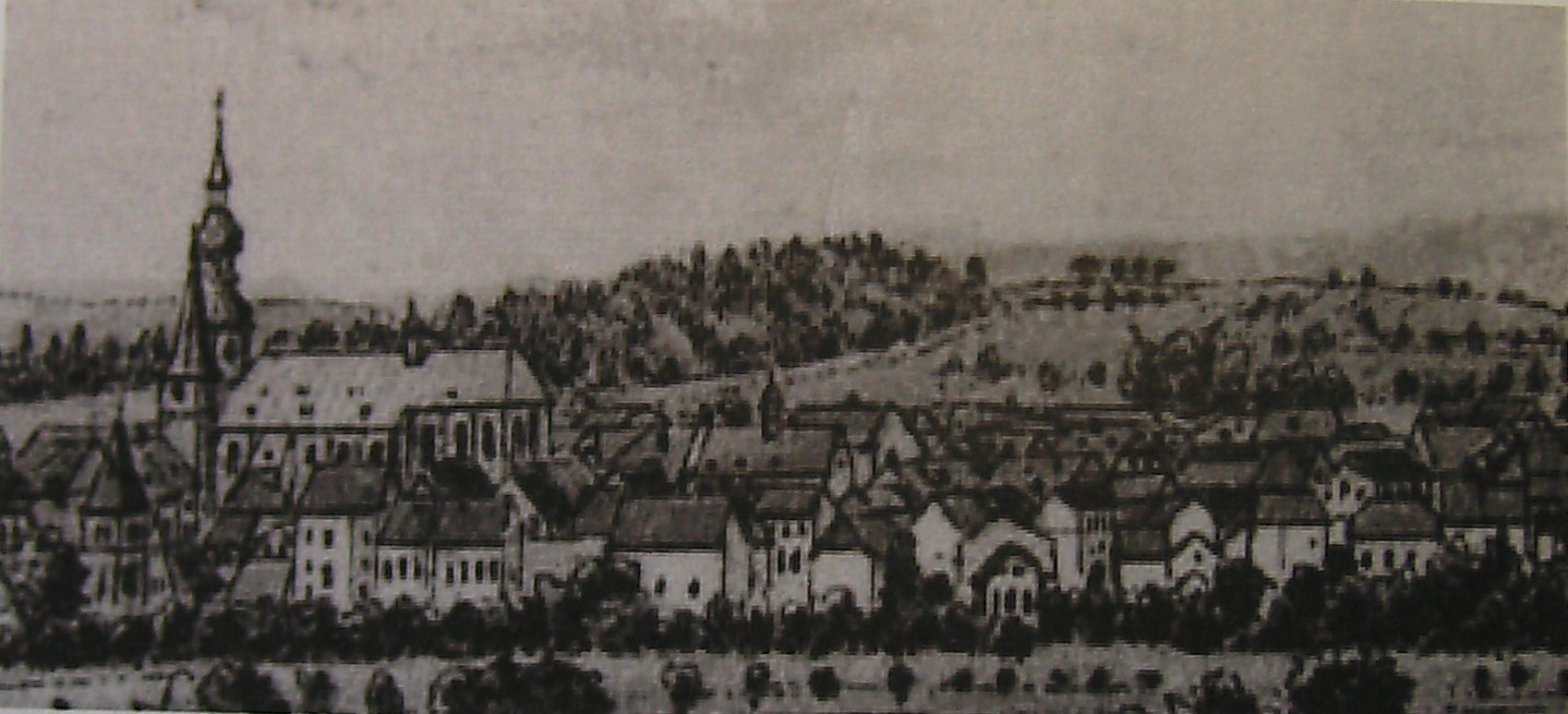 St. Wendel: Stadtansicht mit Basilika und Magdalenenkapelle (in etwa der Mitte, mit Türmchen) Lithographie von 1894.